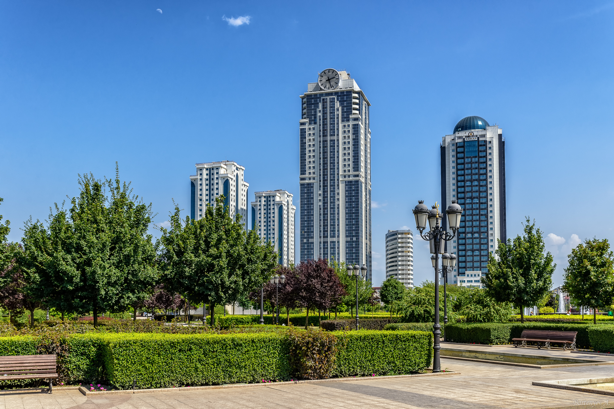 Грозный Сити